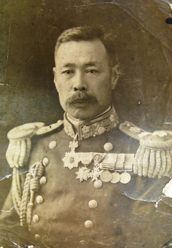 石橋甫